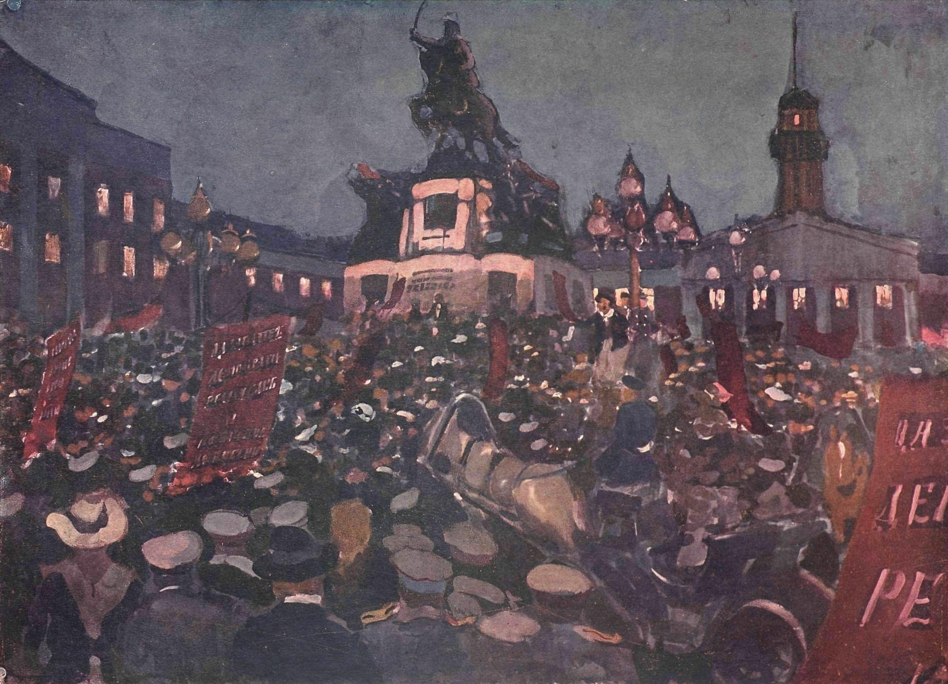 На Скобелевской площади в Москве в дни Февральской революции.